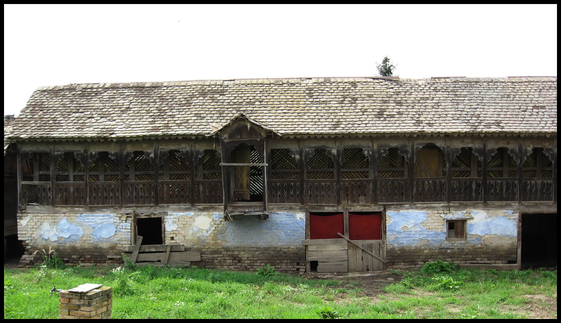 Kotobanja iz 1908. godine